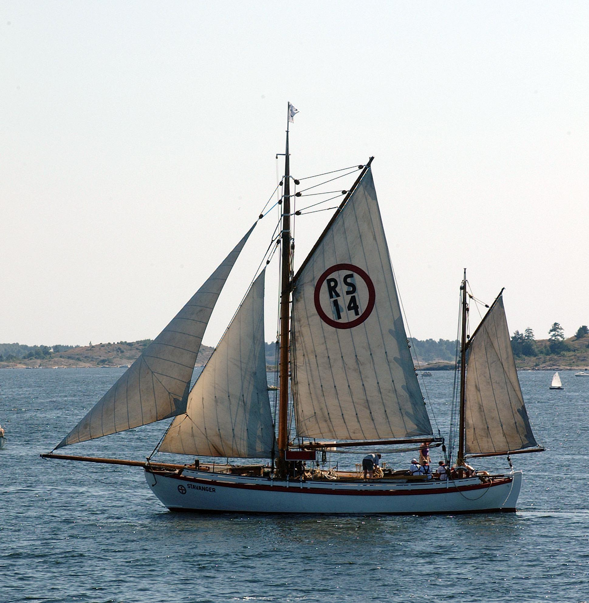 Redningsselskapets dag 7. juni 2002 på Jarlsø. RS "Stavanger".